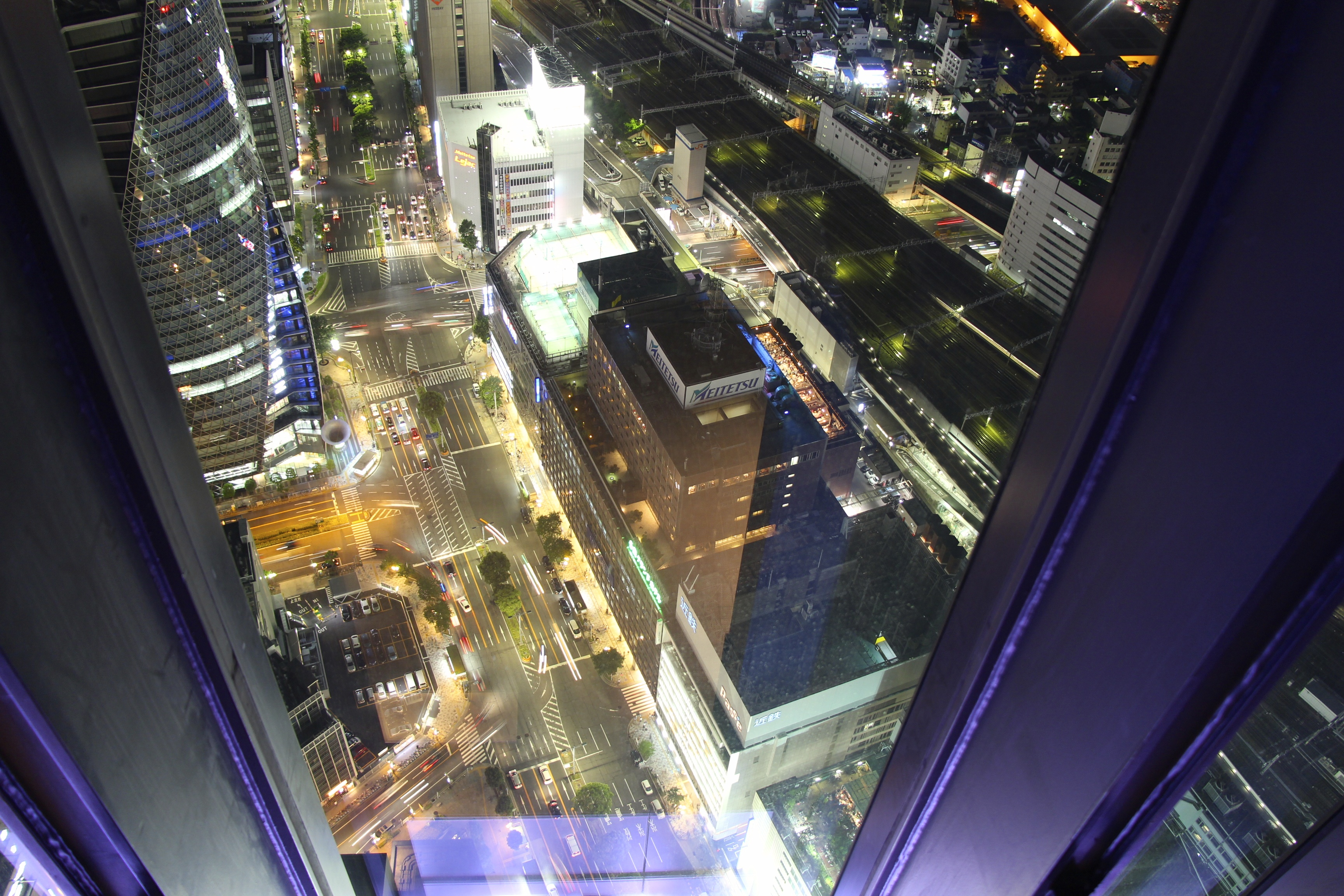 ミッドランドスクエア 展望台 夜景